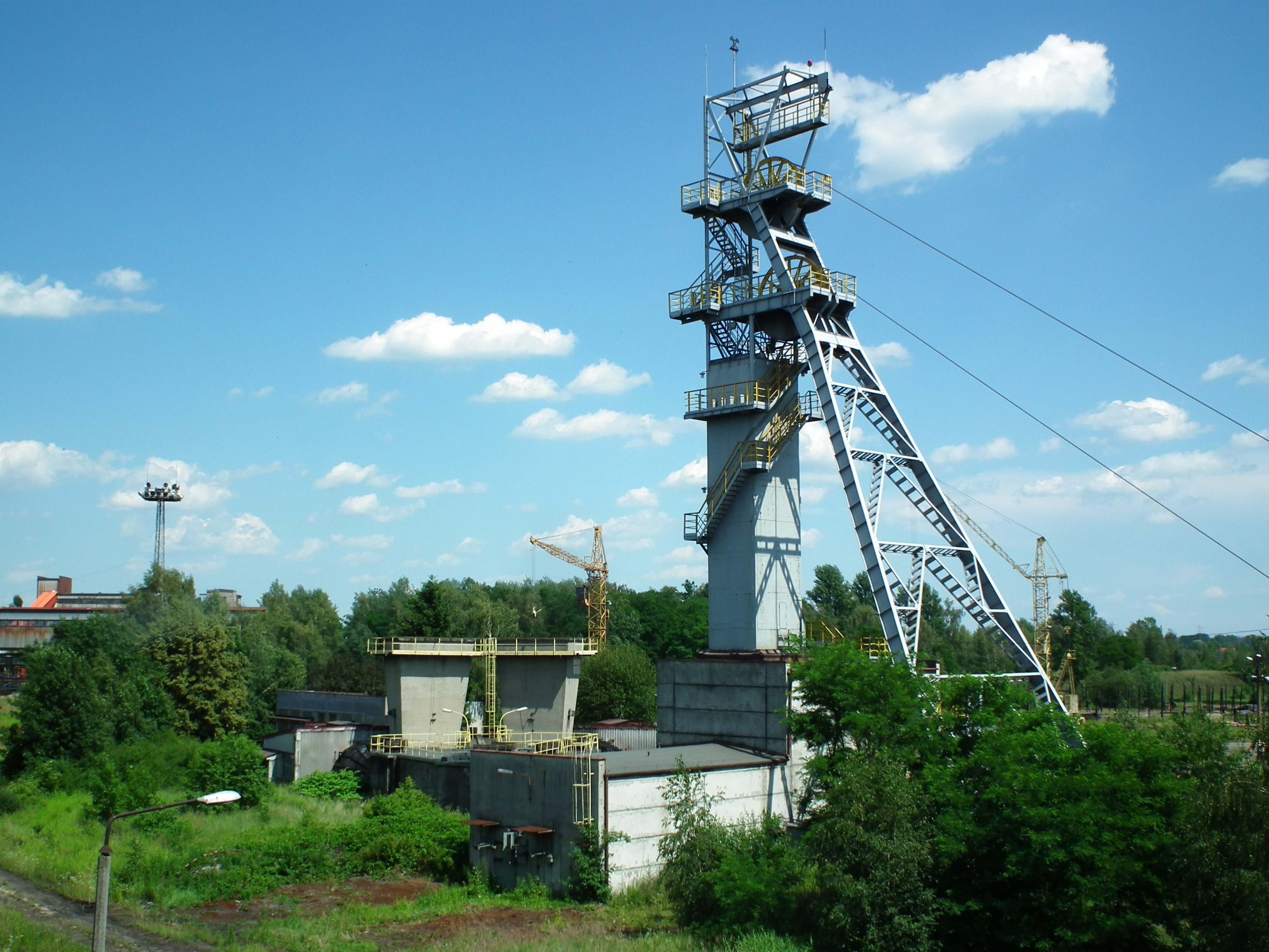 Kopalnia Kazimierz Juliusz w Sosnowcu.